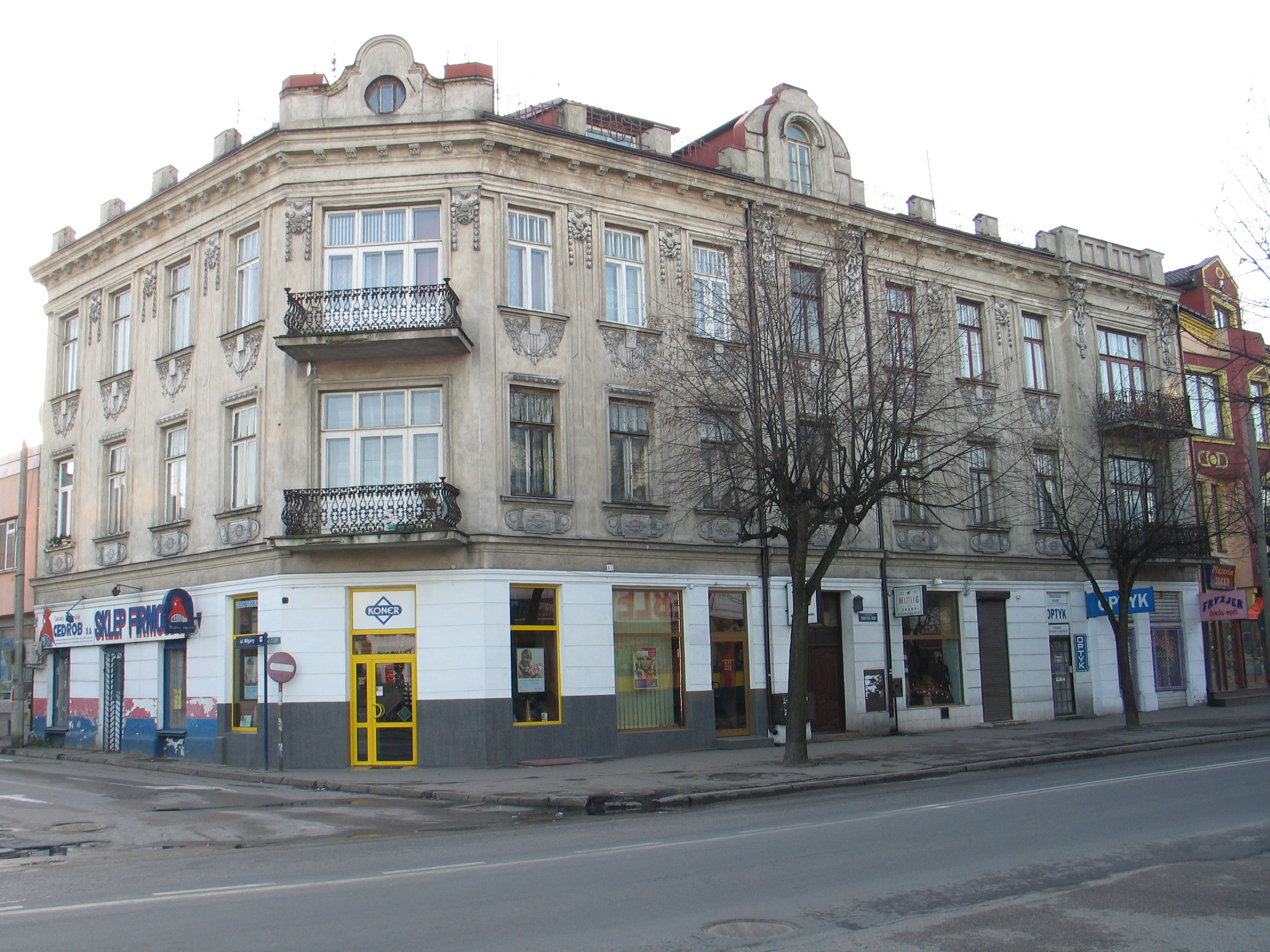 Kamienica secesyjna w Mławie, ul. Żwirki 11